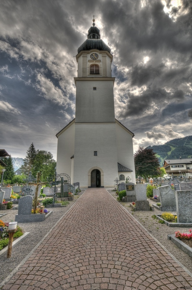 Von Osten gesehen